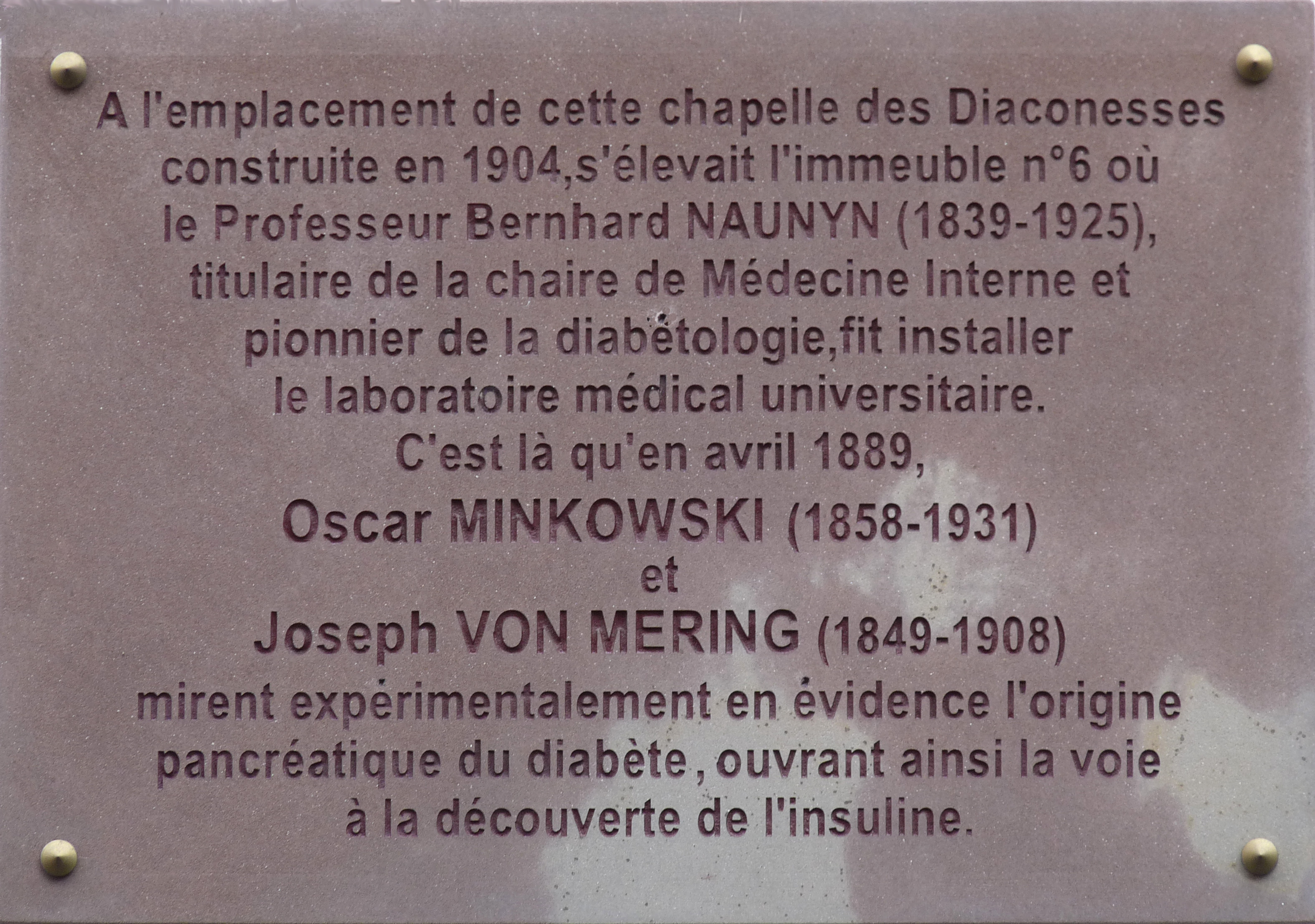 Plaque commémorant Oscar Minkowski et Joseph Von Mering sur le mur de la chapelle des Diaconesses, rue Sainte-Elisabeth à Strasbourg